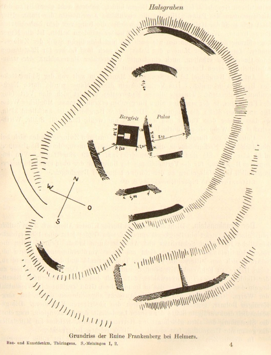 Lageplan der Burgruine Frankenberg über Helmers, westlich von Schmalkalden.